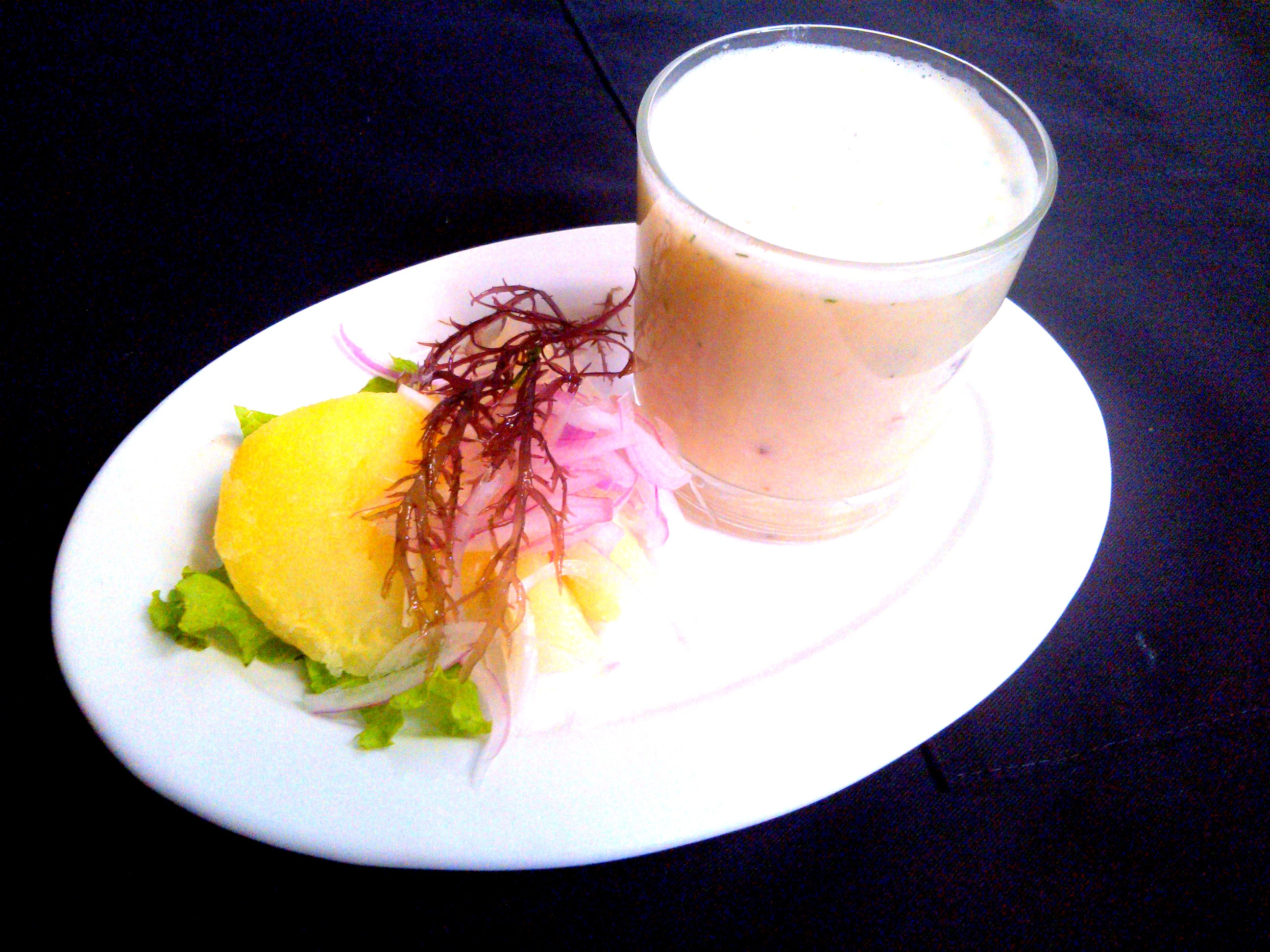 Entrada representativa marina peruana hecha a base del jugo del cebiche y crema de cocona (fruto regional de la ciudad de iquitos)